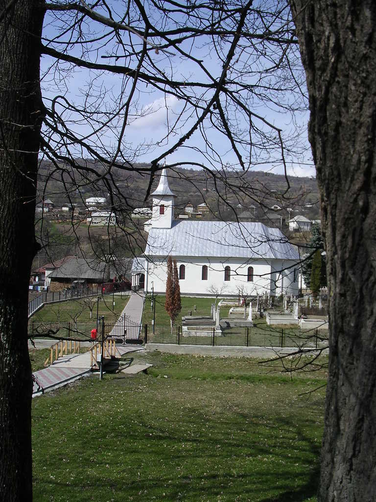 Biserica Sf. Cosma și Damian (2004, foto Alex)